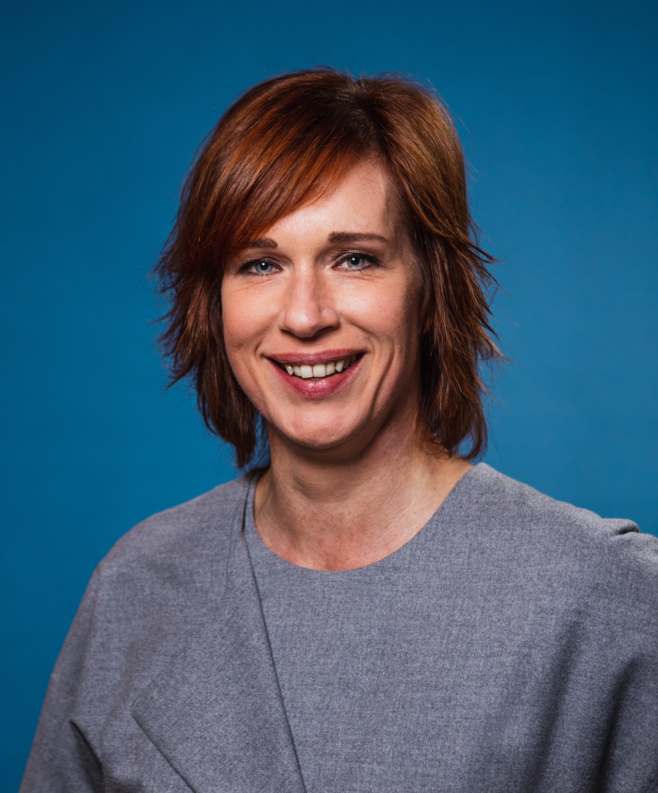 Onze Europarlementariërs